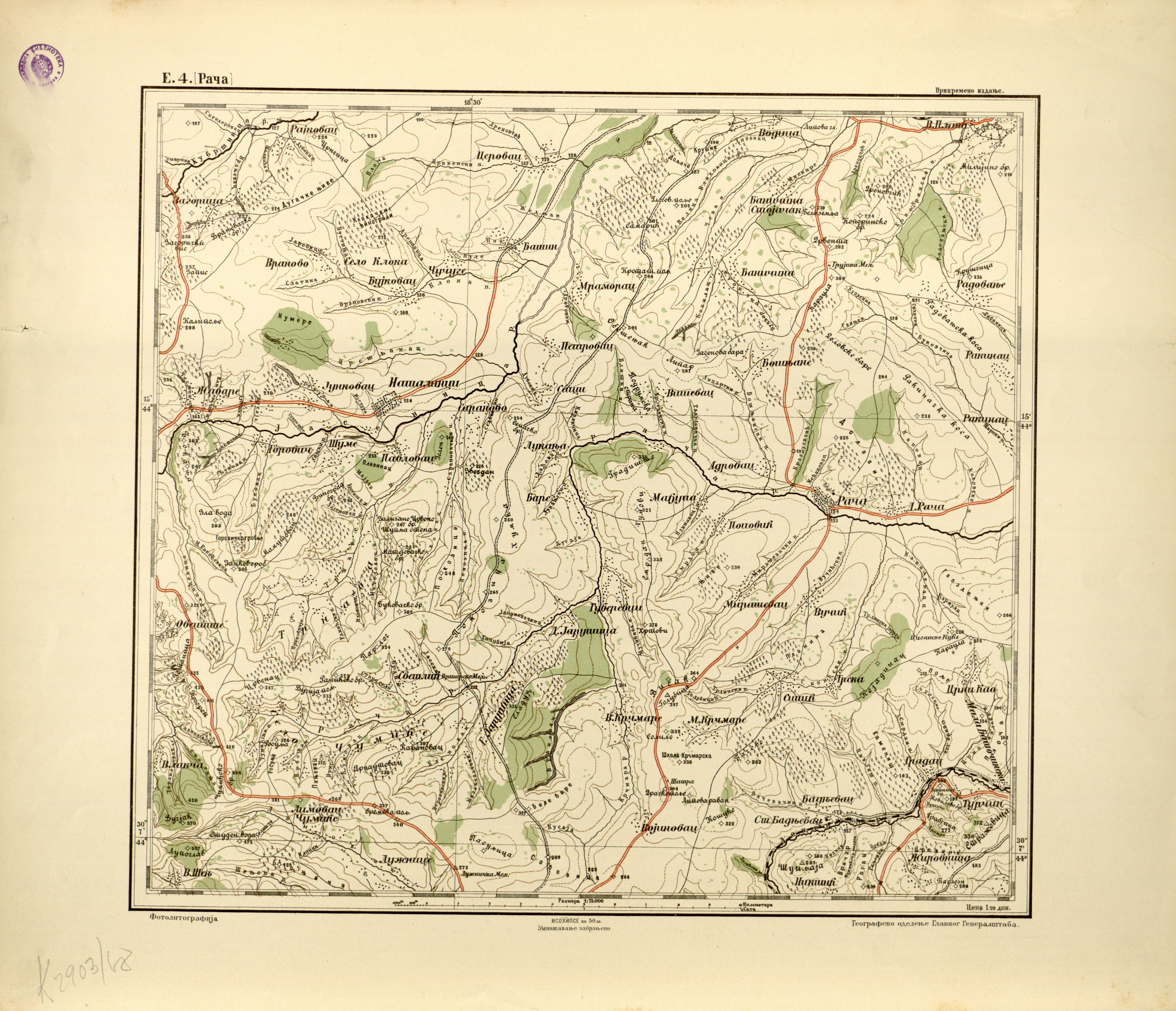 Дигитална копија Ђенералштабне карте Србије. Карта је штампана у Београду 1894. године, у 94 секције, са топографским кључем и у размери 1:75.000. То је прва специјална војна карта Србије која је штампана у земљи. Лист Е.4.Рача.